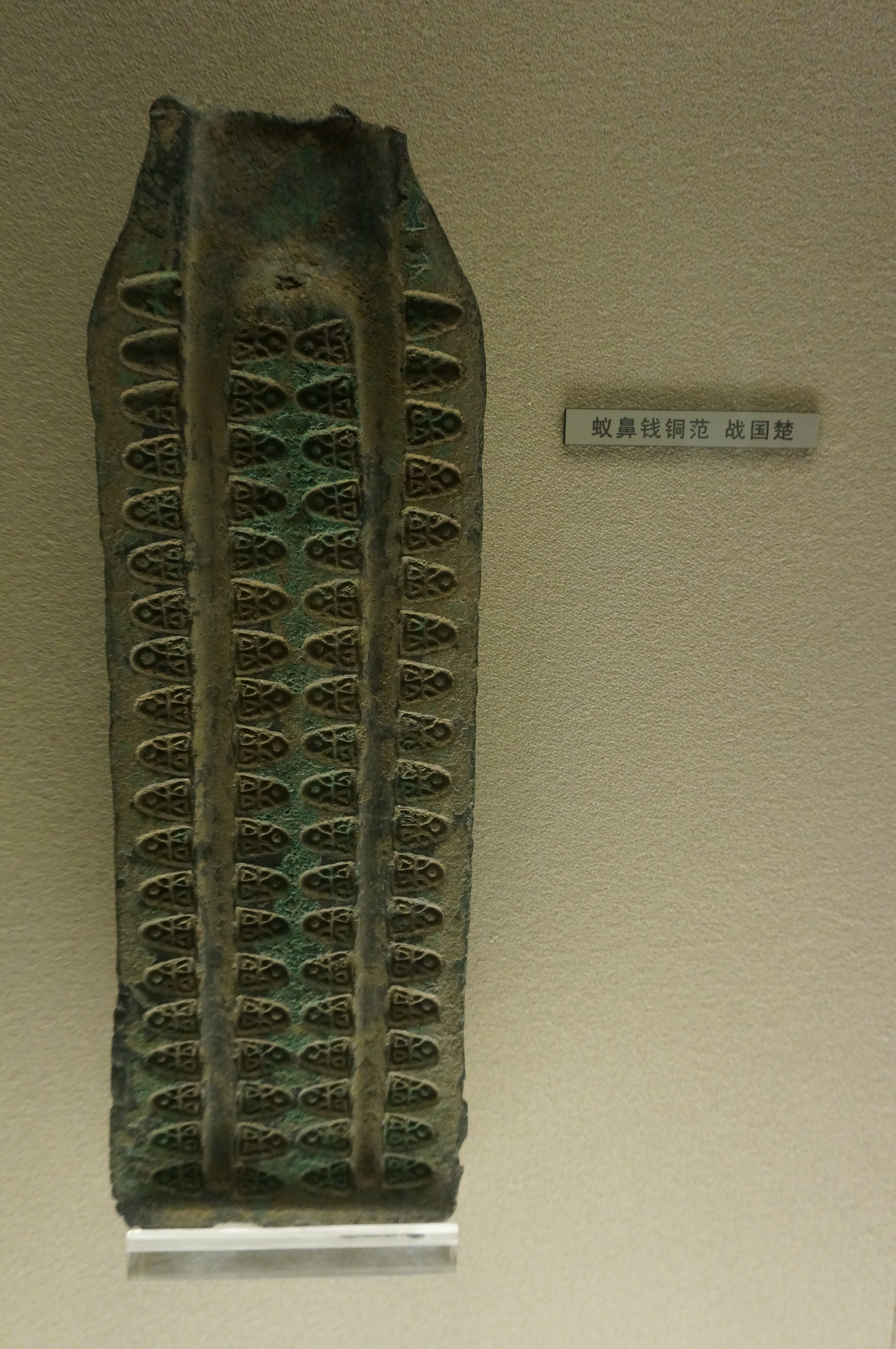 战国楚蚁鼻钱铜范，上海博物馆藏。